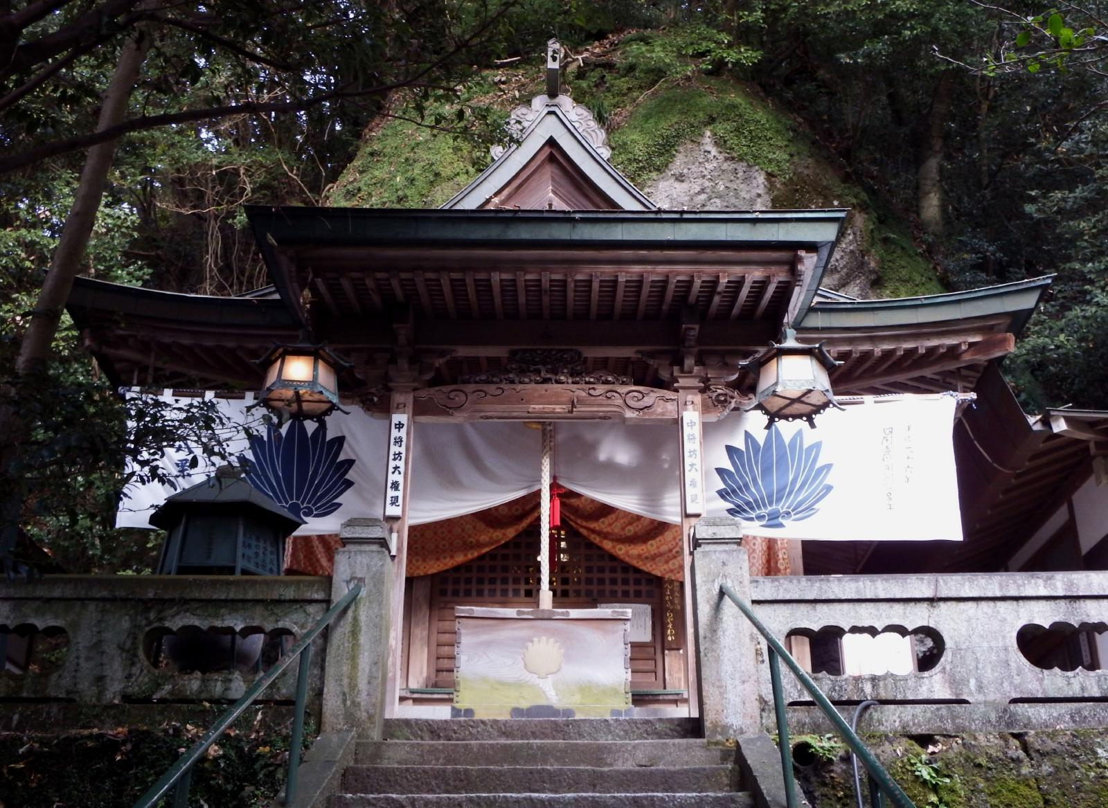 八栗寺の中将坊堂